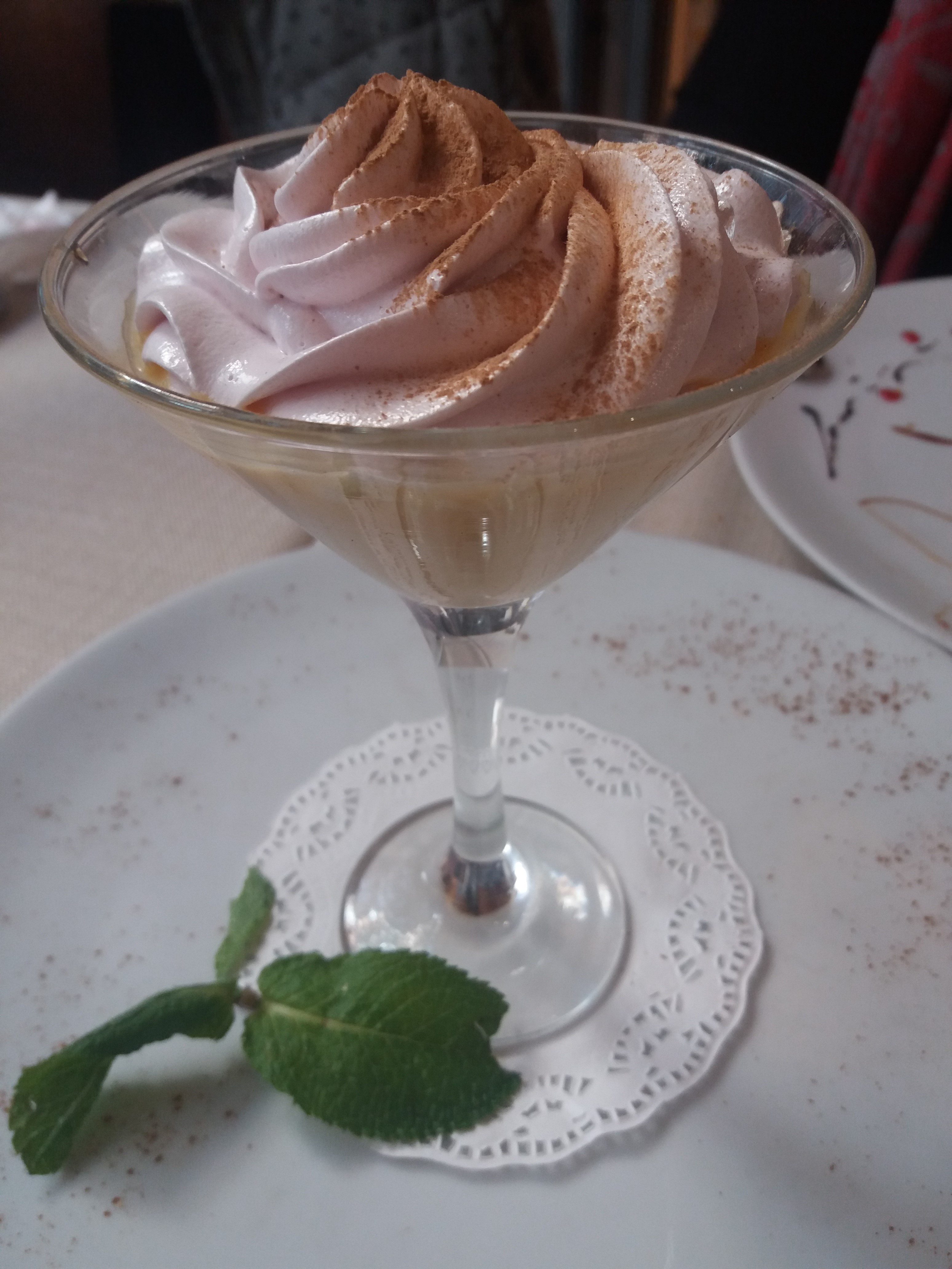 postre peruano